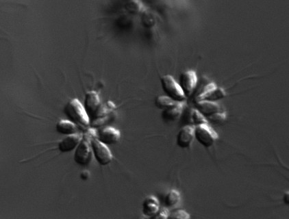 Salpingoeca rosetta Colonies